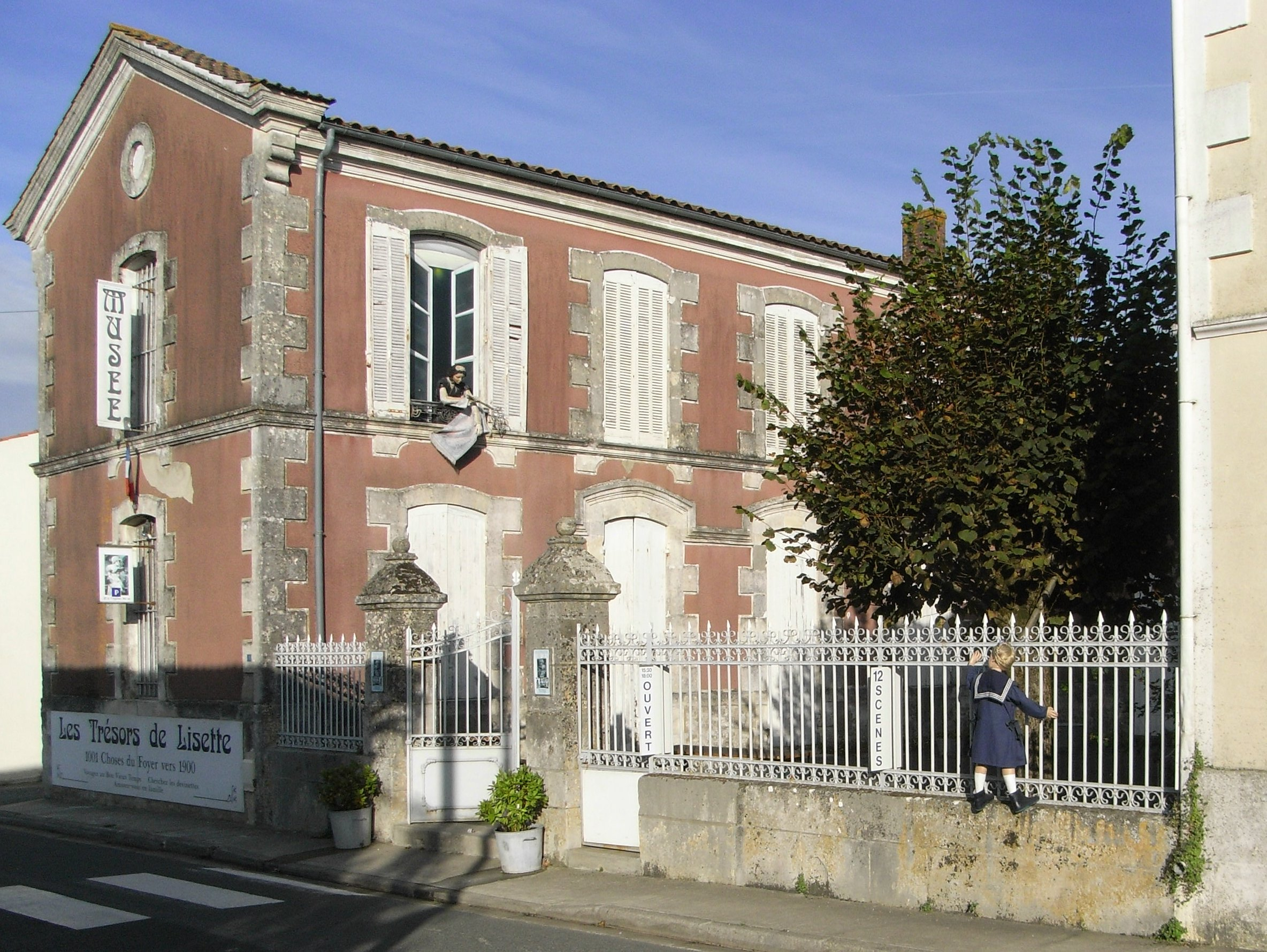 Musée les Trésors de Lisette à Archingeay en Charente-Maritime (France).